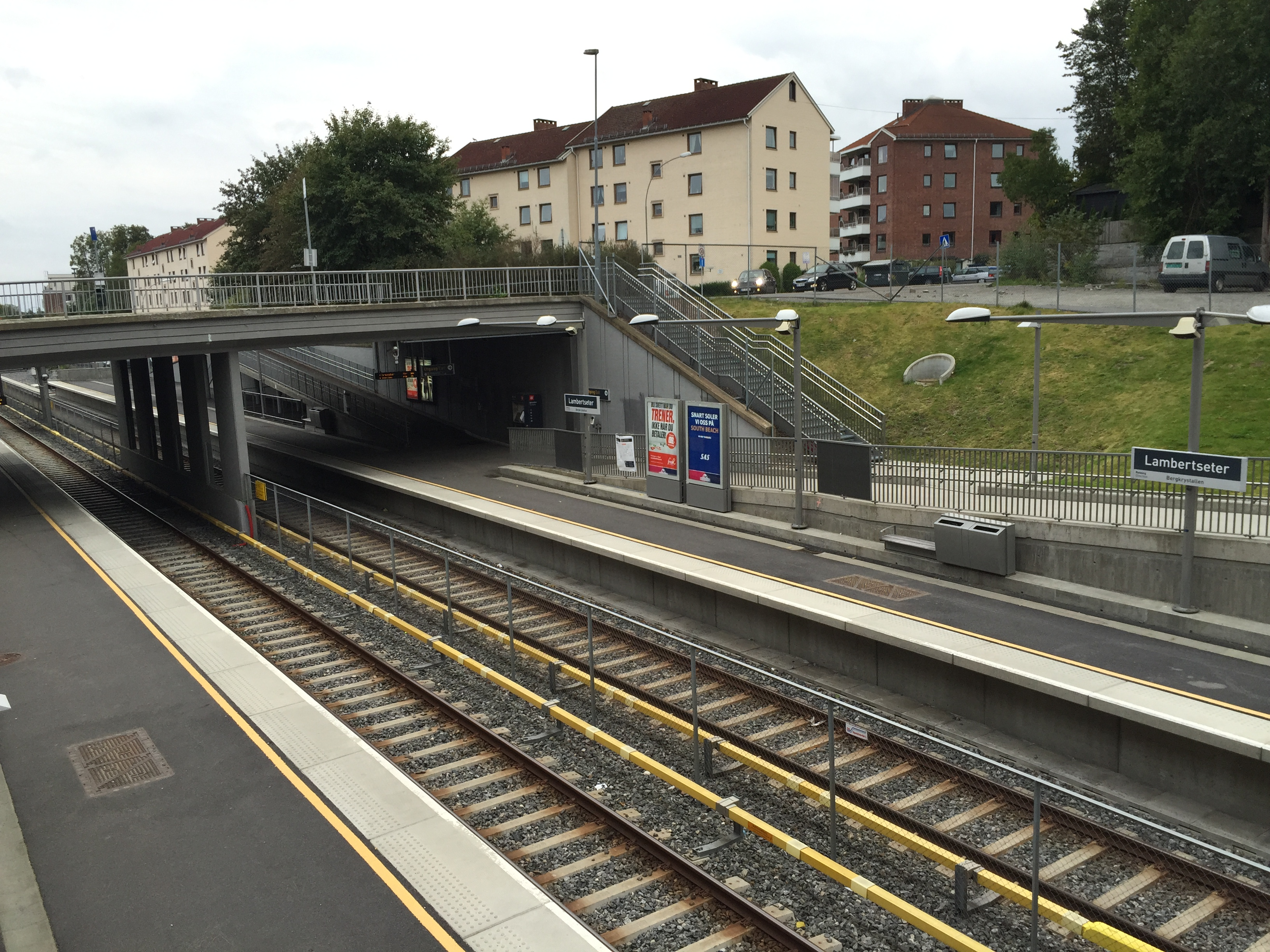 Lambertseter stasjon, 13 sept 2015